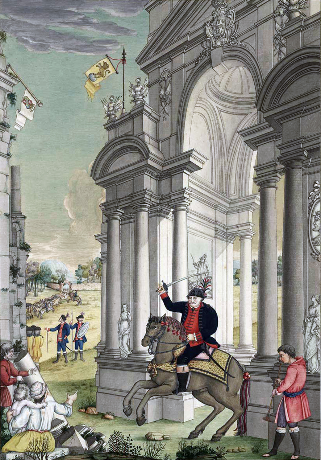 Alegoria : "Victoria alcançada por Pinto Bandeira de Minas Geraes contra os hespanhoes, provavelmente na guerra do Sul em 1762"